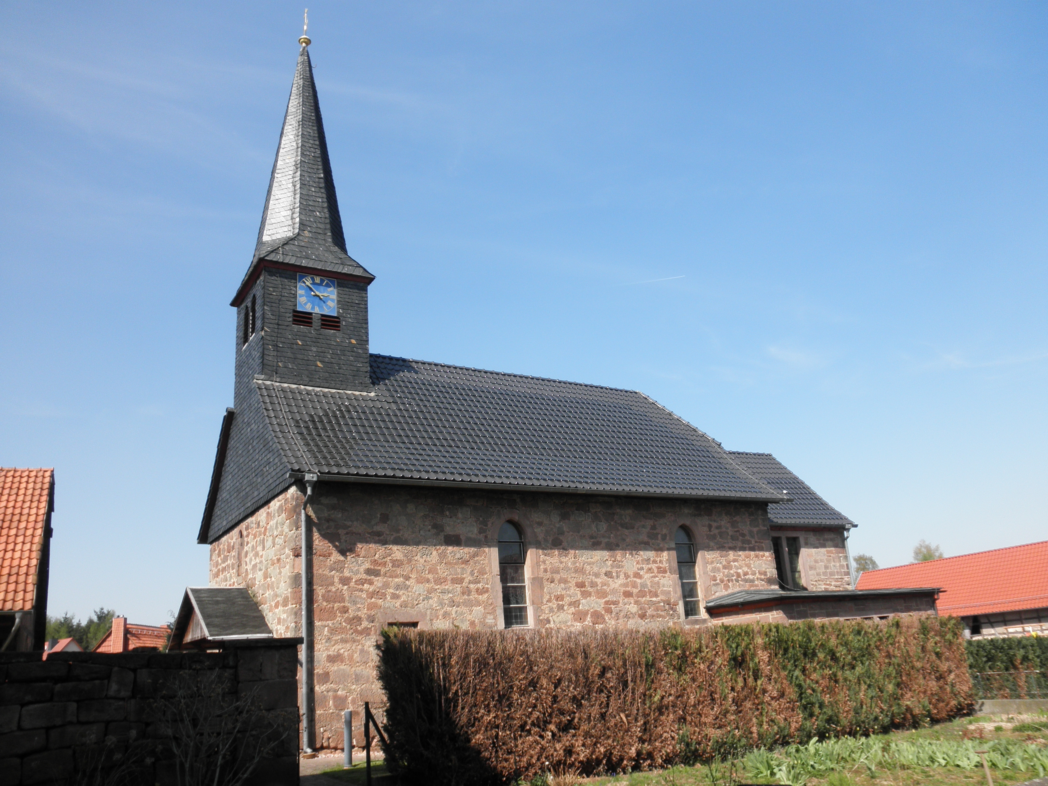 Kirche in Burgwalde